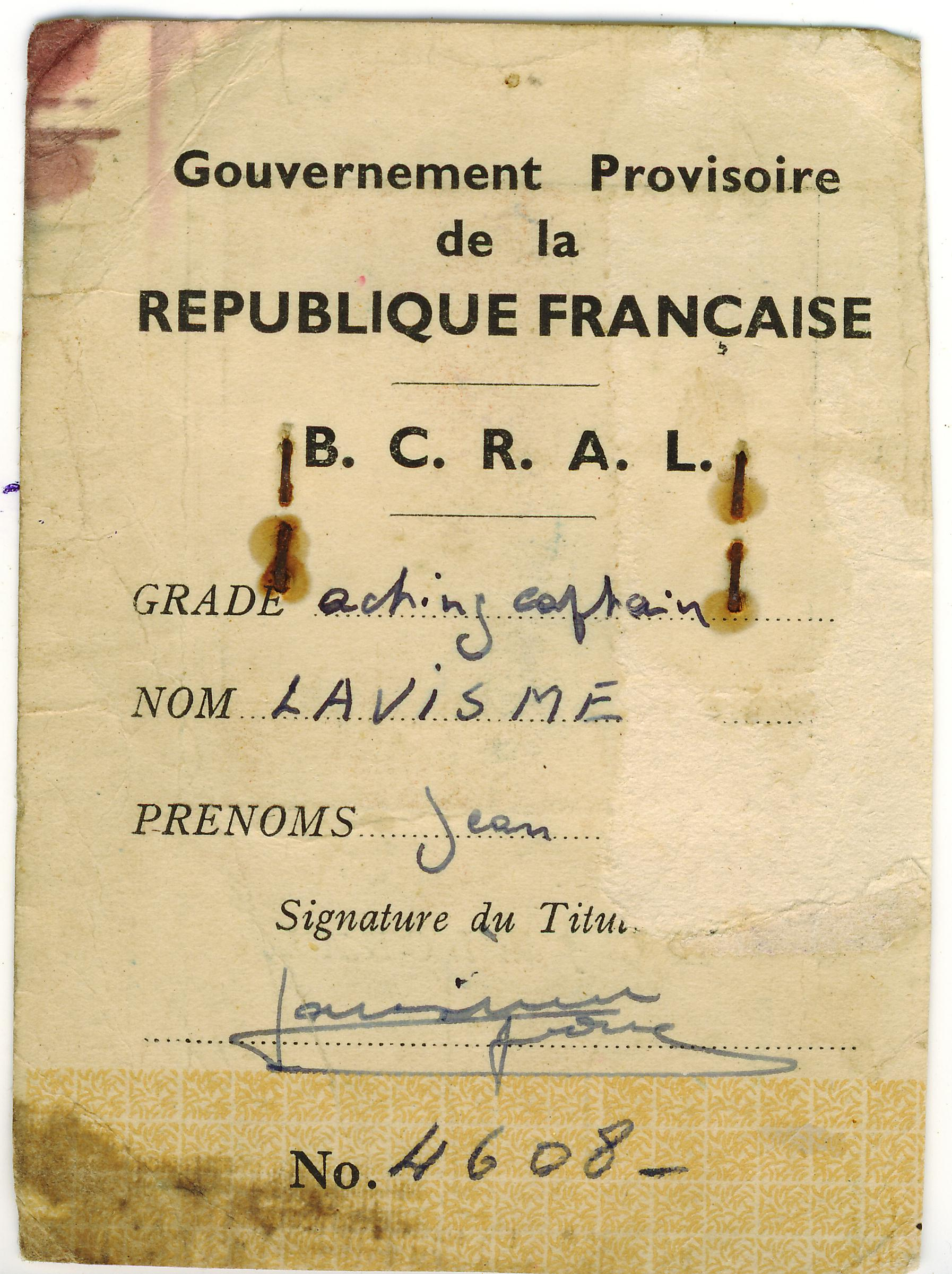 Verso de la carte d'identité du capitaine Jedburgh Jean Larrieu, délivré par le B.C.R.A.L. en Juin 1944.